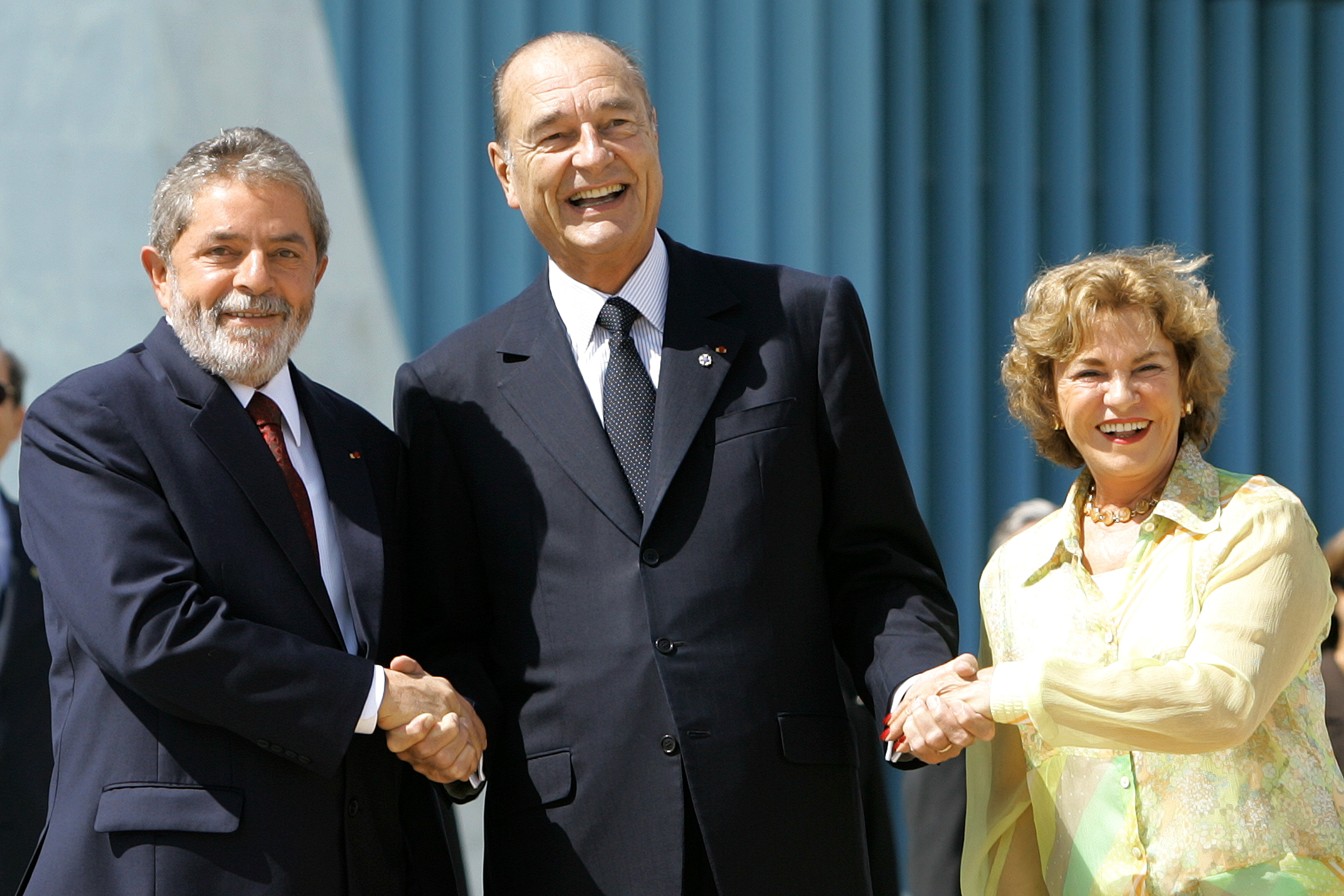 O presidente da França, Jacques Chirac cumprimenta o presidente Luiz Inácio Lula da Silva e Dona Marisa durante cerimônia no Palácio da Alvorada em Brasília.The president of France, Jacques Chirac greets the president of Brazil, Luiz Inácio Lula da Silva and wife Marisa during a cerimony at the Palácio da Alvorada in Brasília.